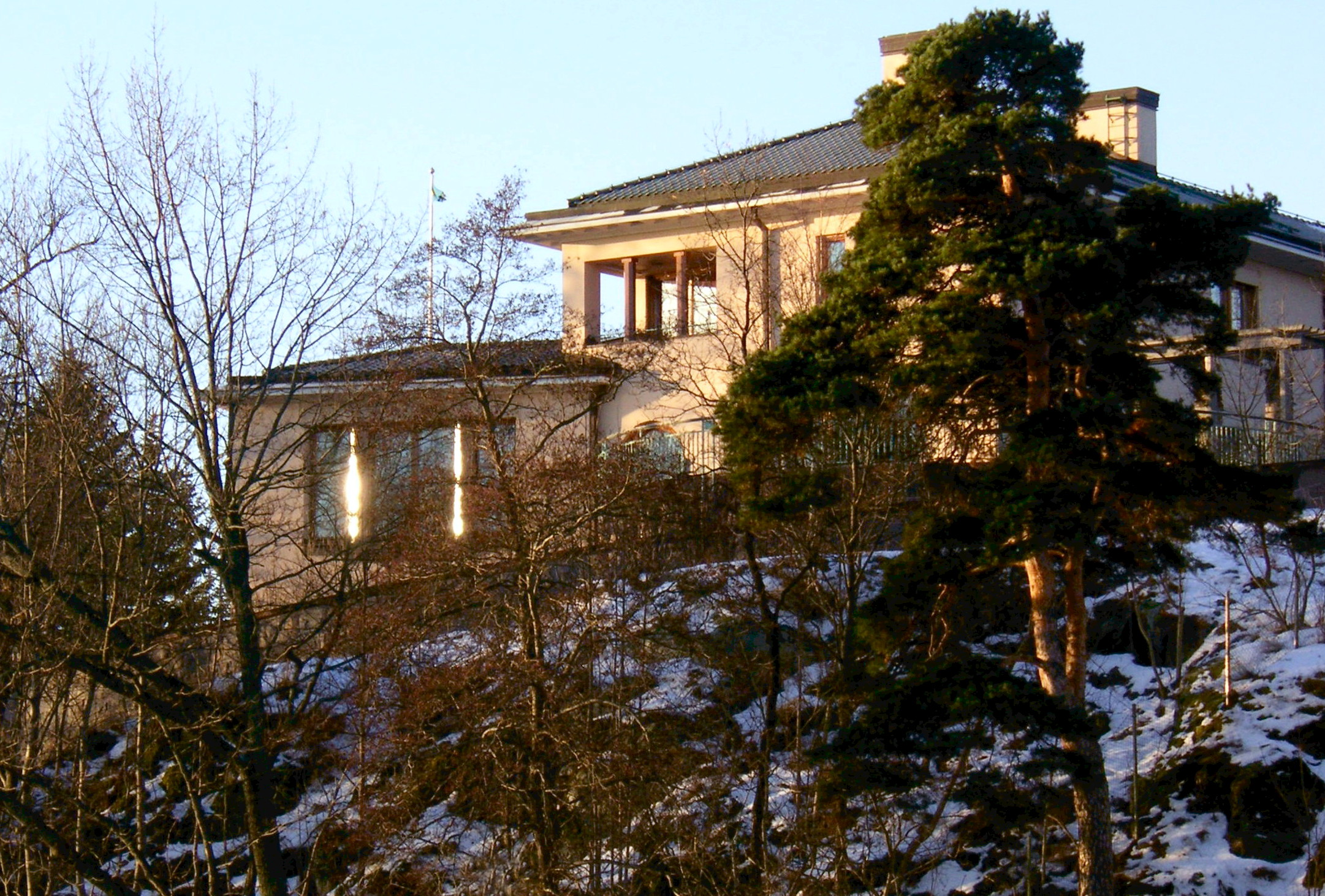 Villa Ekudden, Strandvägen 13, Djursholm, arkitekt Gillberg arkitekter